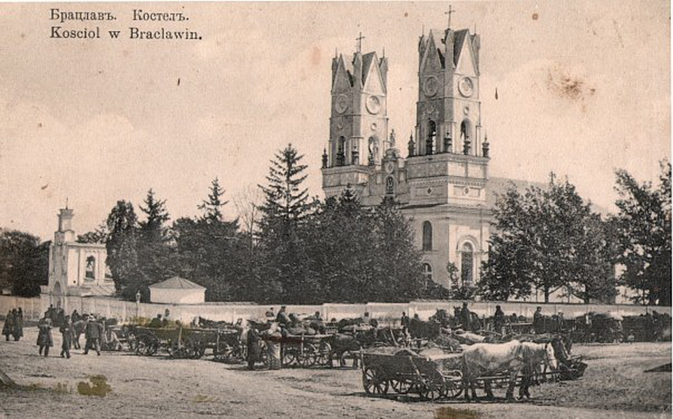 Костьол, Брацлав, вул. Комарова,1